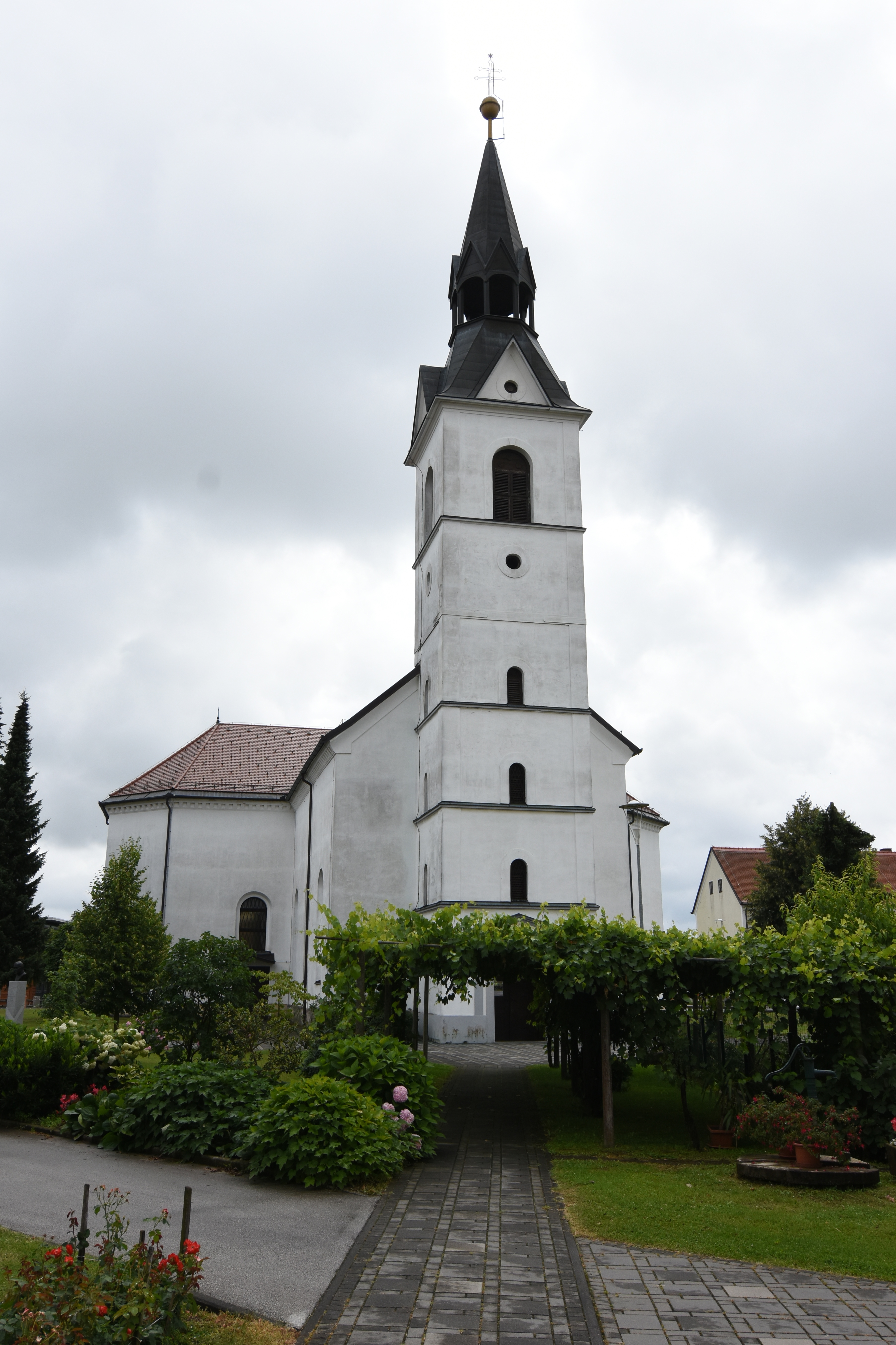 Župnija Sv. Marjeta niže Ptuja Gorišnica